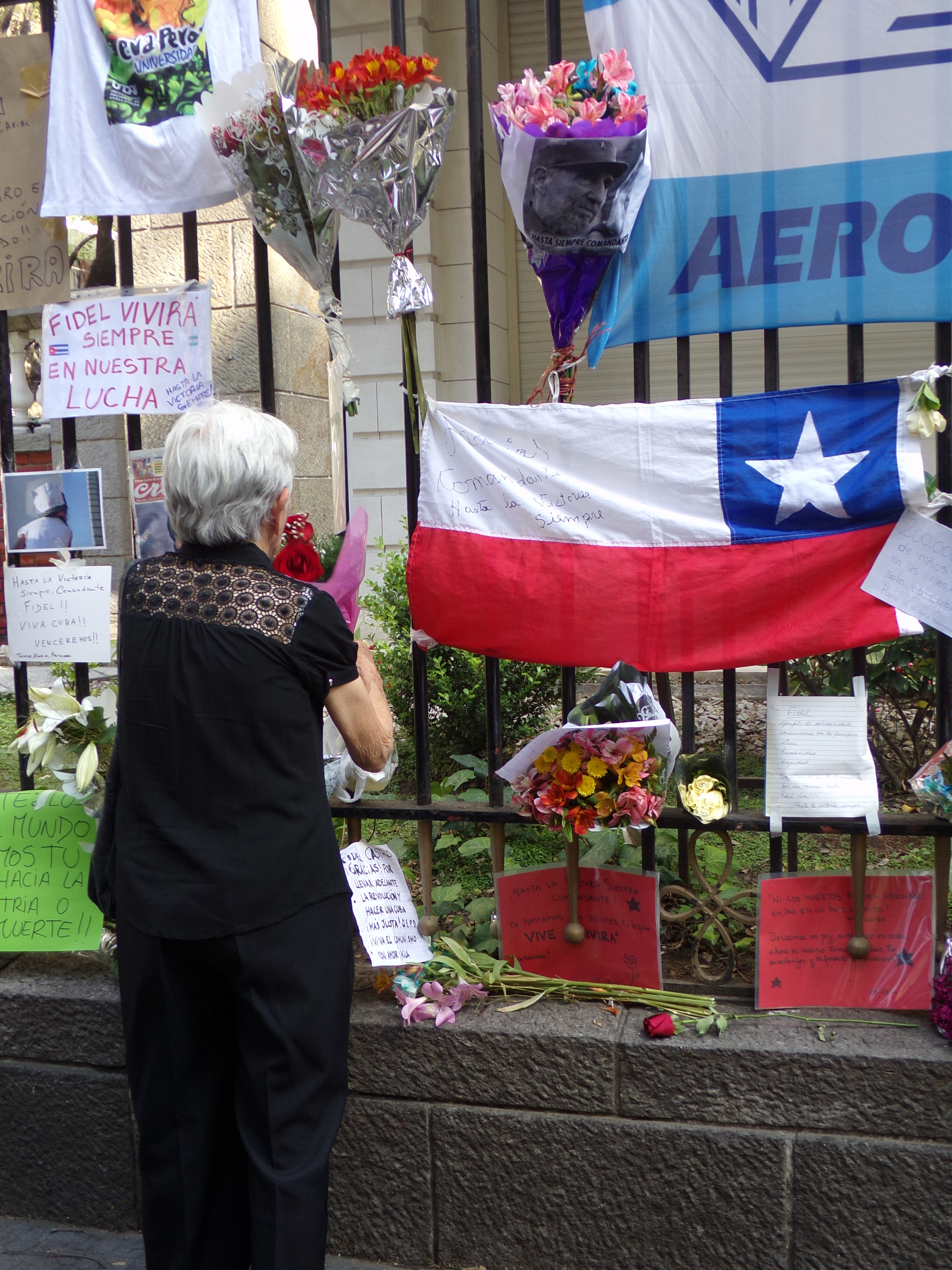 Homenajes a Fidel Castro en la Embajada de Cuba en Buenos Aires, Argentina, tras su fallecimiento.